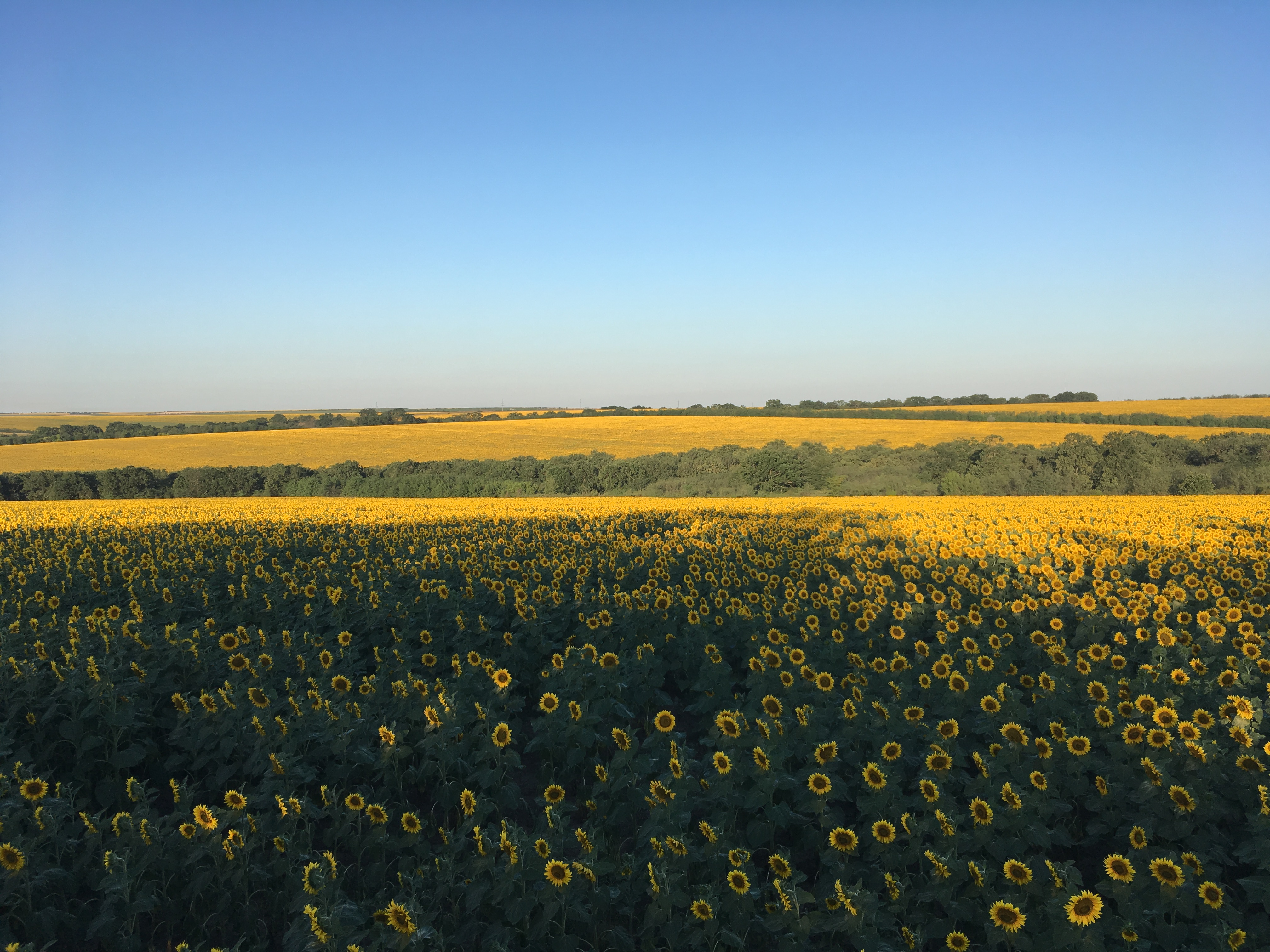 Iulie 2020, pe câmp